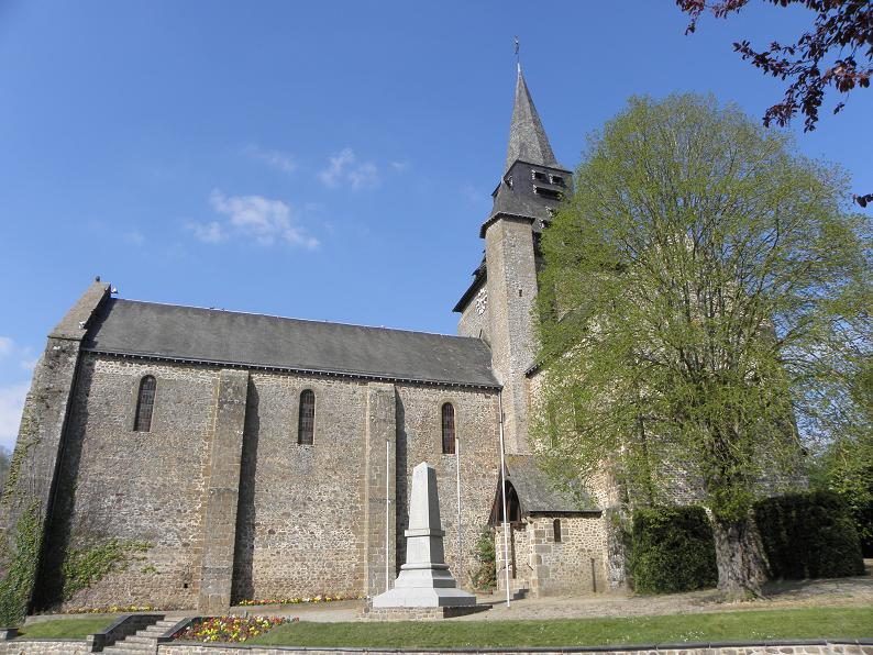 Église Notre-Dame d'Ambrières-les-Vallées (53).